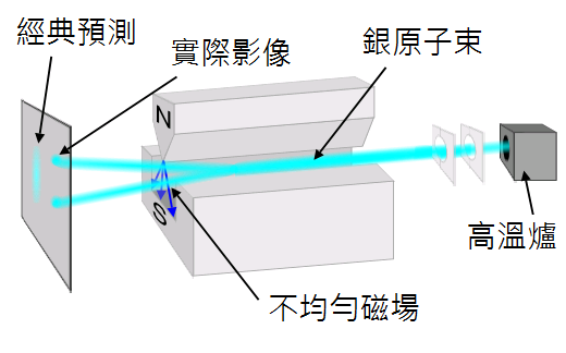 斯特恩-革拉赫實驗裝置圖